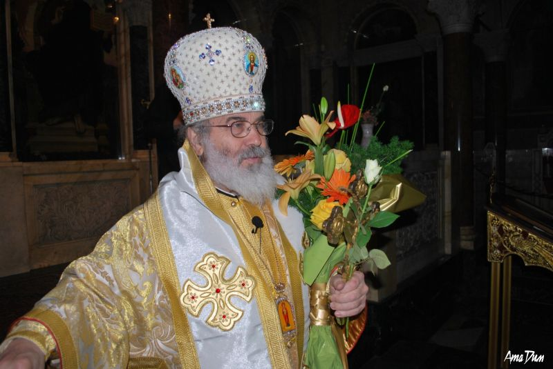 Негово Високопреосвещенство митрополит Йосиф, на САЩ, Канада и Австралия, получава поздравления по случай рожденния си ден в края на светата литургия, отслужена по случай празника Никулден в патриаршеската катедрала "Свети Александър Невски" в София